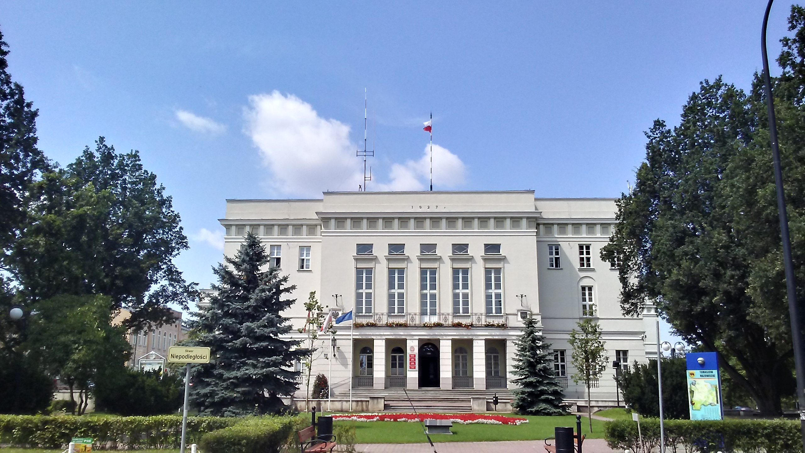 Siedziba Urzędu Miasta pobudowana w trakcie kadencji rady miejskiej 1921-1927. Architekt: Aleksander Raniecki